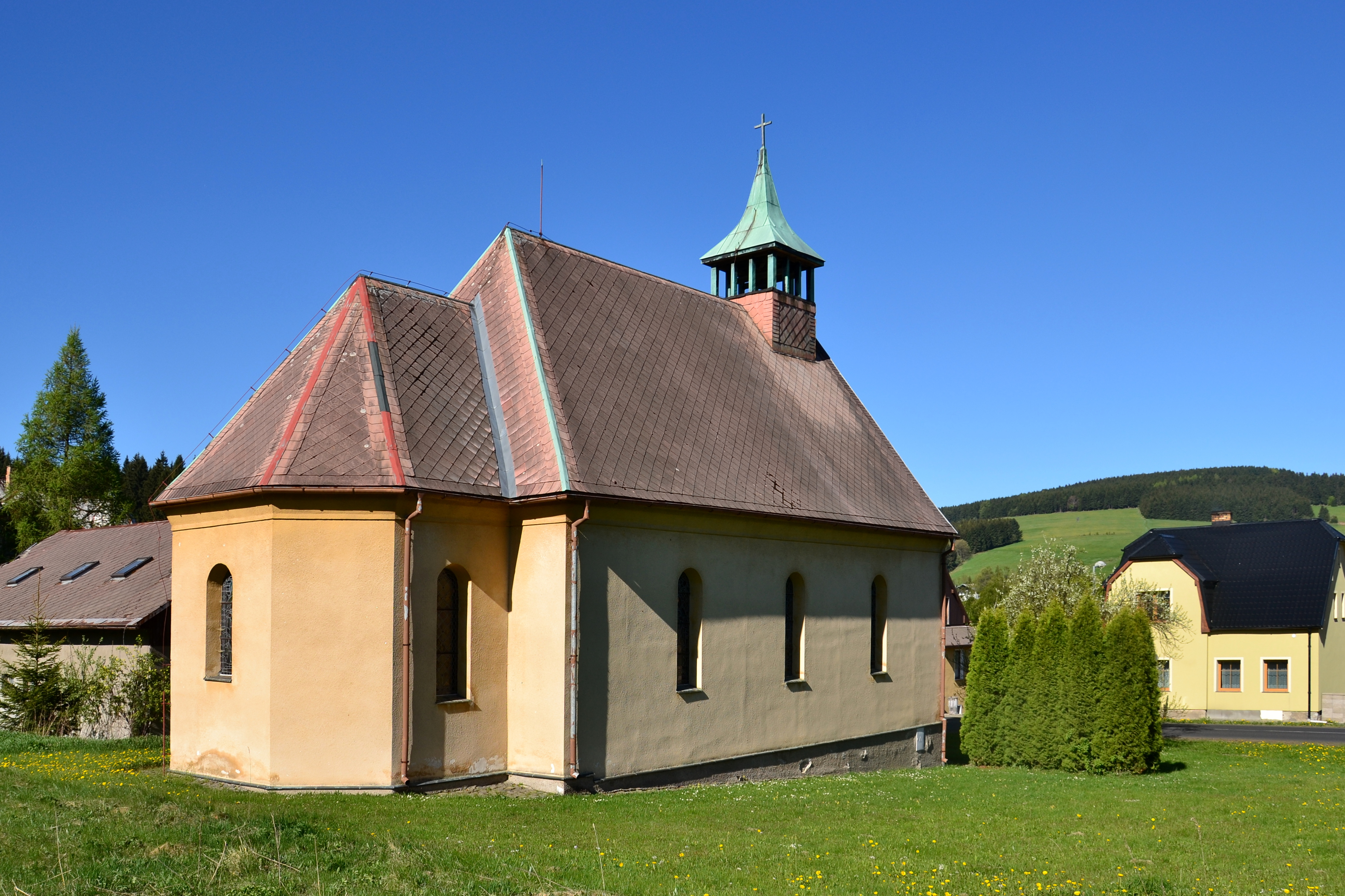 České Hamry – kostel svaté Alžběty Uherské